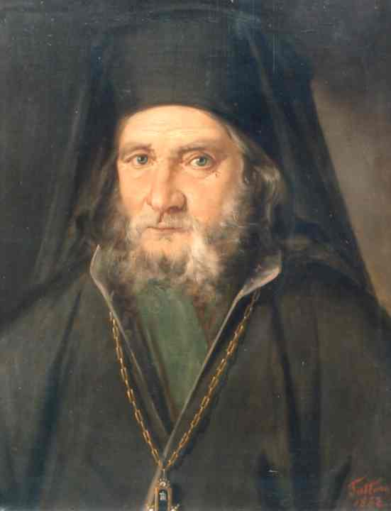 Gheorghe Tattarescu - Arhimandritul Rovin Târgşoreanu, Muzeul Municipiului Bucureşti, datat 1862. Tattarescu îl cunoștea din copilărie, arhimandritul fiind un apropiat al ocrotitorului său, episcopul Chesarie. Lucrarea a participat, în timpul vieții artistului, la expoziția internațională de la Viena și la expoziția din București a Societății Amicilor Bellelor Arte, ambele au avut loc în anul 1873, iar în 1881, la cea de-a patra expoziție a ,,artiștilor în viață’’, unde Tattarescu a și ajutat la organizare.